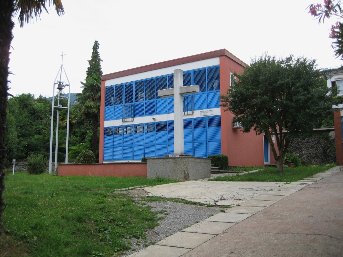 Kapela sv. Ivana od Boga u Ičićima, nekadašnja kuća Ive Robića